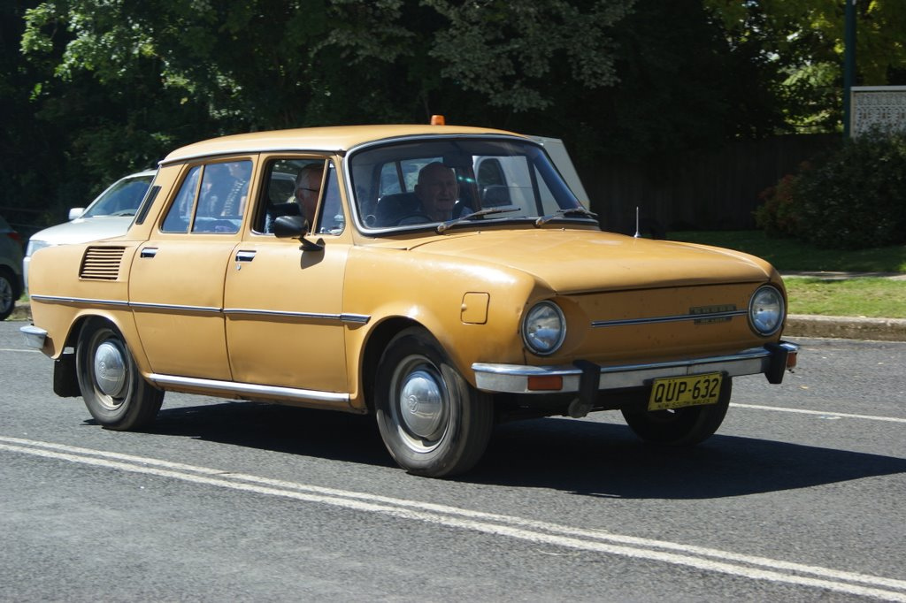 Škoda 110L s poznávací značkou Nového Jižního Walesu, Austrálie.